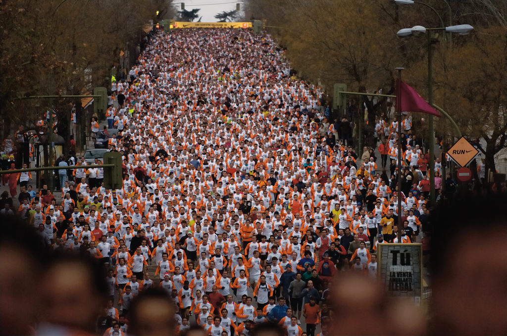 San Silvestre Race San Silvestre Vallecana